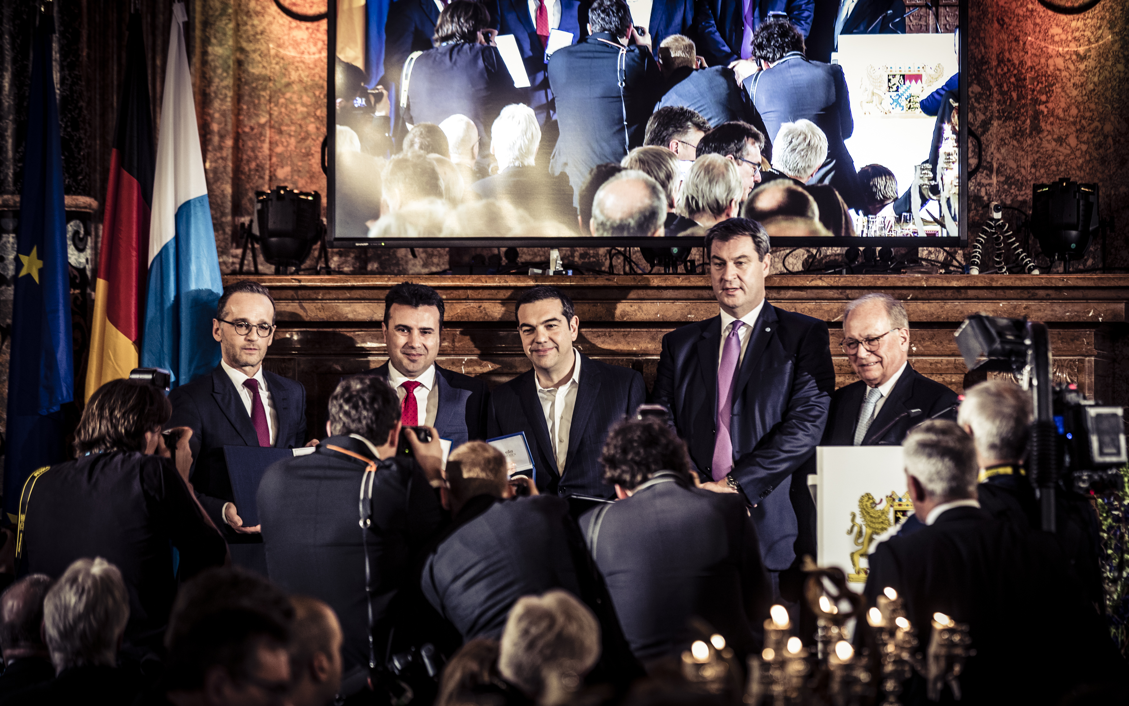 Heiko Maas, Zoran Zaev, Alexis Tsipras, Markus Söder und Wolfgang Ischinger während der Münchener Sicherheitskonferenz 2019